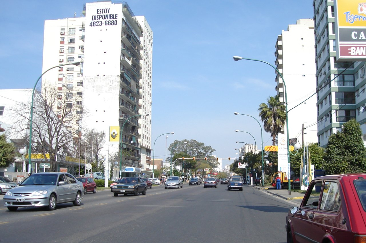 La Avenida del Libertador a su paso por el barrio de Olivos, cabecera del partido de Vicente López, a metros de su intersección con la calle Corrientes.